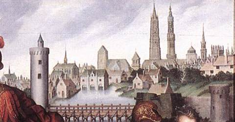 Antoon Claeissens, Mars Vanquishing Ignorance (1605), extract, cf. File:Antoon Claeissens - Mars Vanquishing Ignorance - WGA04955.jpg